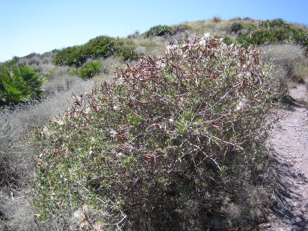 Cornical o cornicabra (Periploca angustifolia) en el Parque Natural de Calblanque en Cartagena (España)